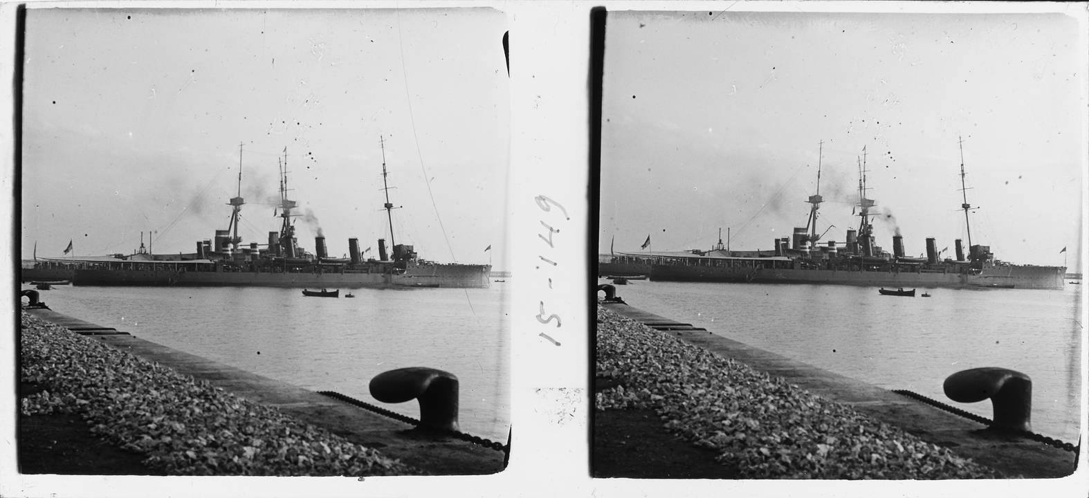 Vista del vaixell Bellona (pertany a l'Armada anglesa)